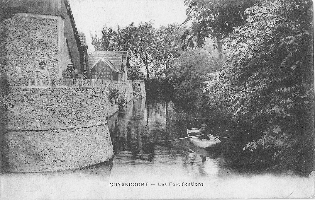 Guyancourt:La ferme fortifiée de Châteauneuf